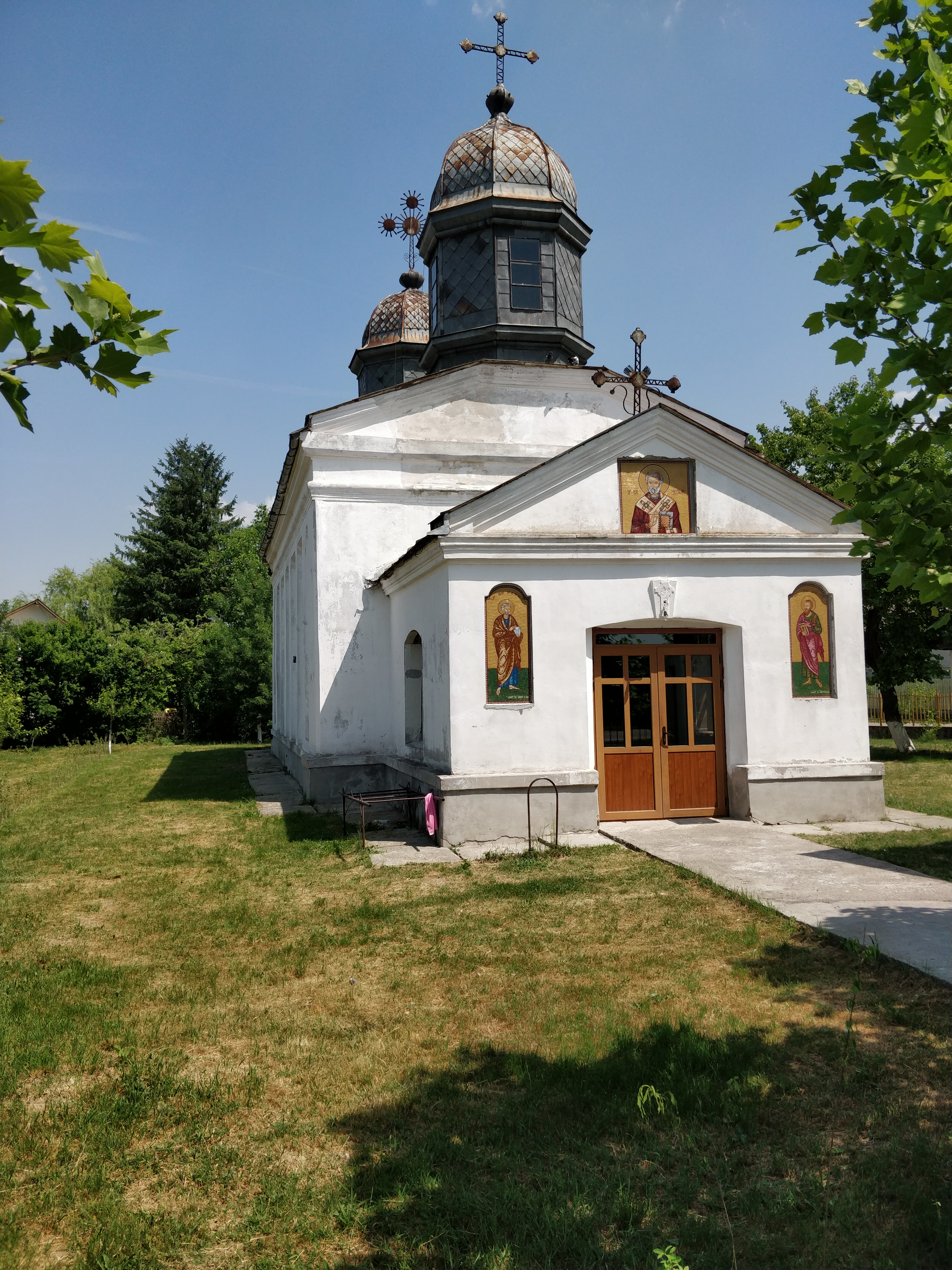 Biserica „Sf. Nicolae” - Zgaia